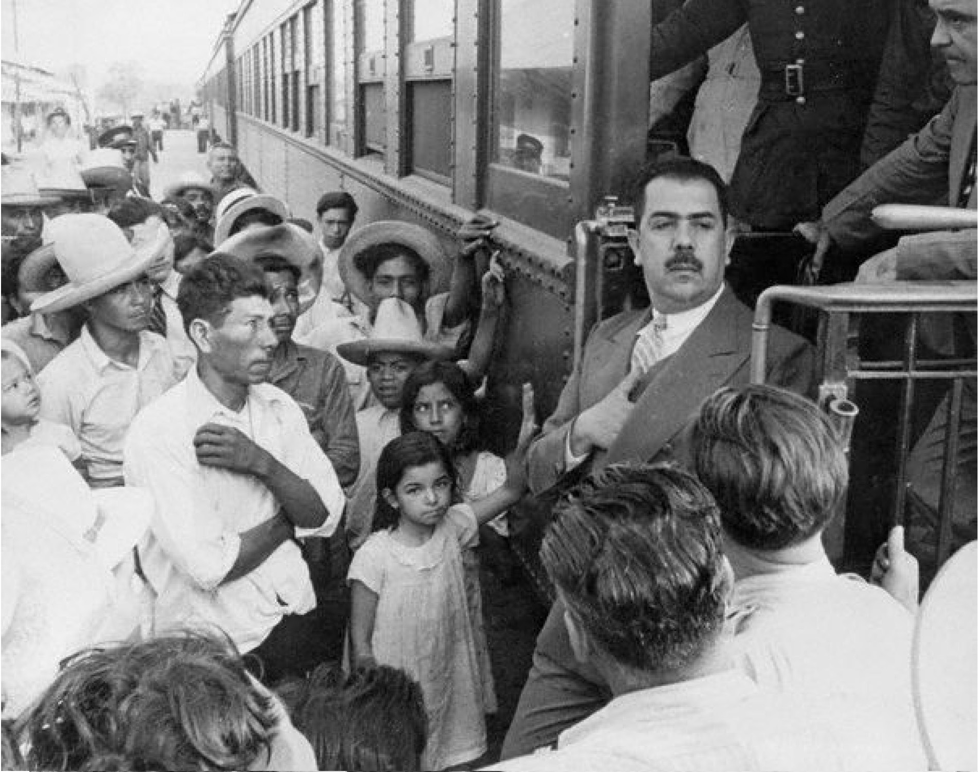 Lázaro Cárdenas del Río, presidente de México 1934-1940, decreta la nacionalización de los ferrocarriles extranjeros en 1937.